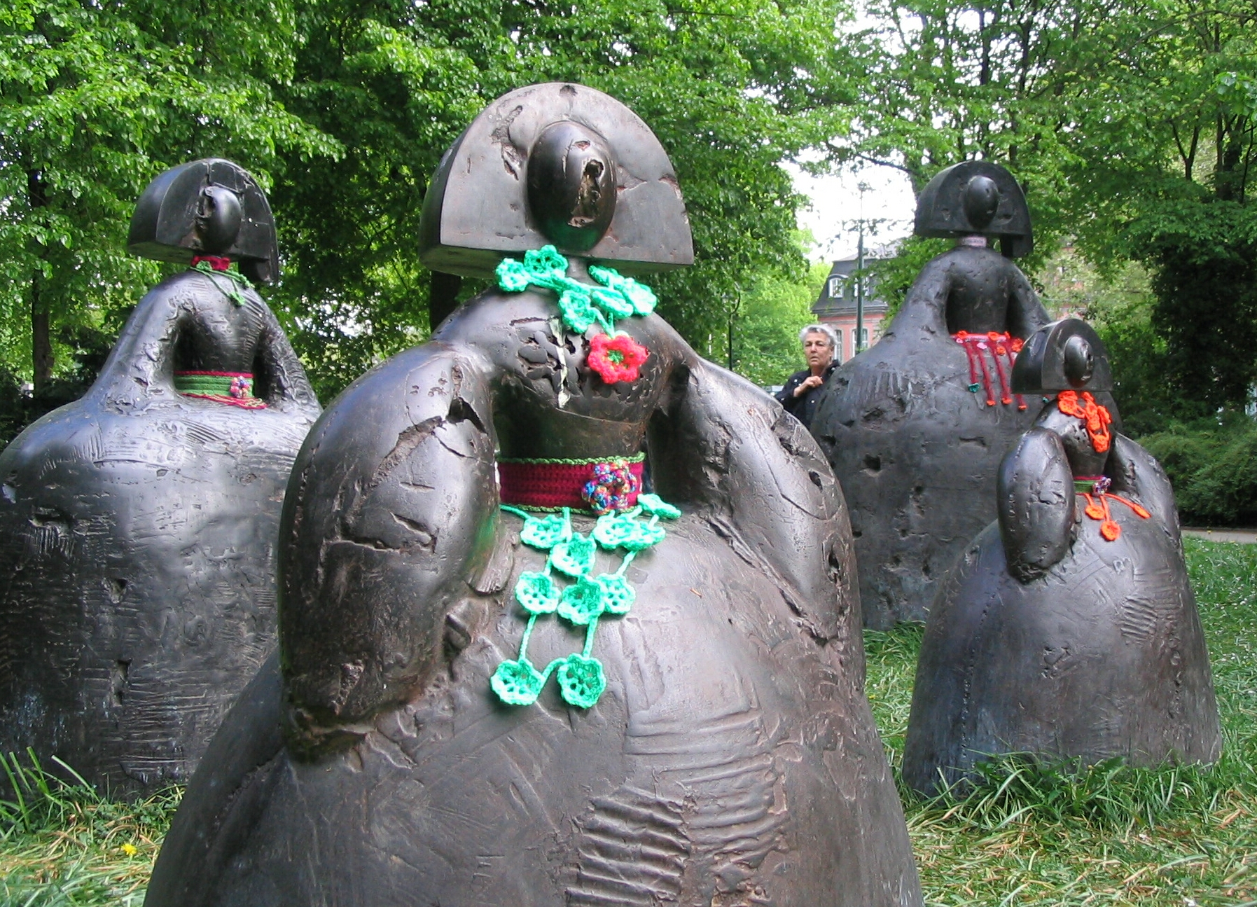 „Meninas“ mit Häkelgarnituren im Düsseldorfer Hofgarten